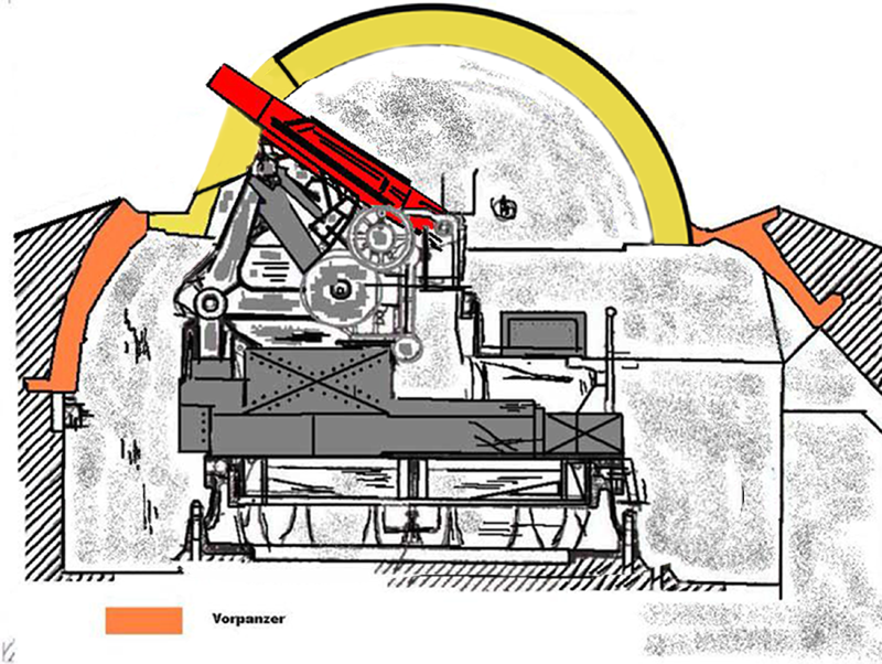 Geschützpanzerturm Modell 09